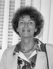 Bonn, 9.7.1991 Die Parlamentarische Staatssekretärin beim Bundesminister für wirtschaftliche Zusammenarbeit, Michaela Geiger, empfing die Außenministerin der Seychellen, Danielle de Saint Jorre, zu einem Informationsgespräch im Bundesministerium für wirtschaftliche Zusammenarbeit.